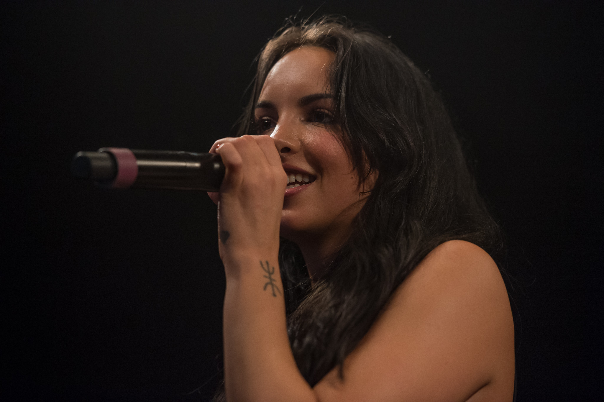 Concertbüro Franken,Der Hirsch,Juju,Konzert,Livekonzert,Livemusik,Musik,SXTN